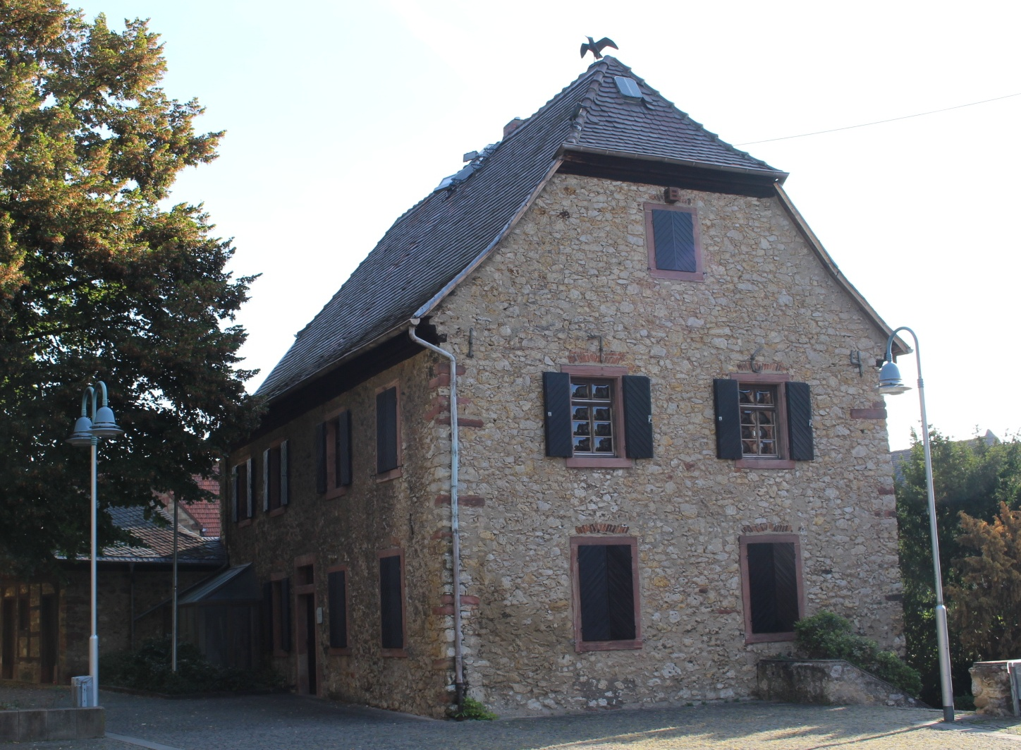 Ehemalige Schule, Kirchgasse 1, 65439 Flörsheim